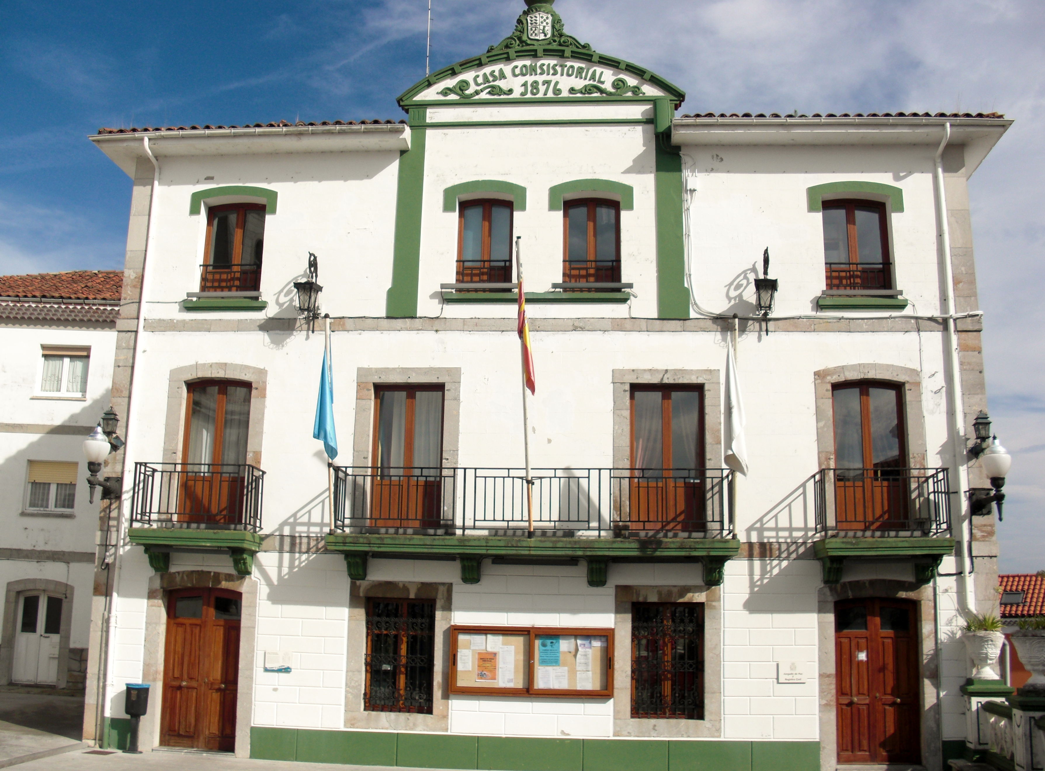 Data de 1876 y tuvo varias remodelaciones a lo largo del tiempo. Muros, Asturias